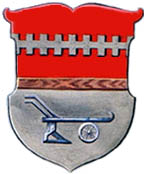 Znak obce Vnorovy v okrese Hodonín, Česká republika